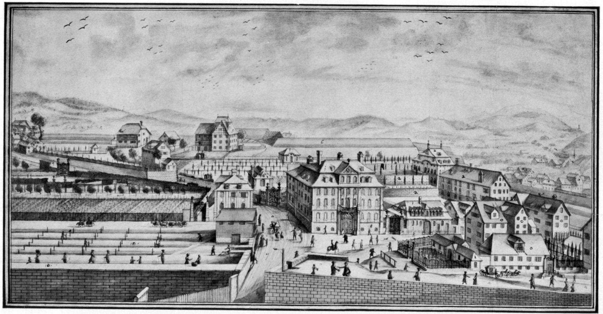 Das Bodmerhaus, die Häuser "Rechberg" (als "Haus zur Krone" für Hans Caspar und Anna Werdmüller-Öri vom Architekten David Morf in den 1760ern zum Stadtpalais ausgebaut), und "Florhof" (die drei Florhöfe im Vordergrund rechts bildeten ab 1700 eines der Zentren der verlagsindustriellen Seidenproduktion in Zürich. Die Rohseide wurde in der Kämmelstube aufbereitet, einer kleinen Manufaktur in der ersten Gebäudereihe rechts des Hühnerhauses der Krone, mit einem Dachaufbau für den Warenaufzug.), Schweiz, um 1772 vom Turm des Kronentors gesehen. Tuschzeichnung.